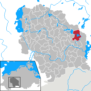 Neu Poserin in Mecklenburg-Vorpommern - District Parchim